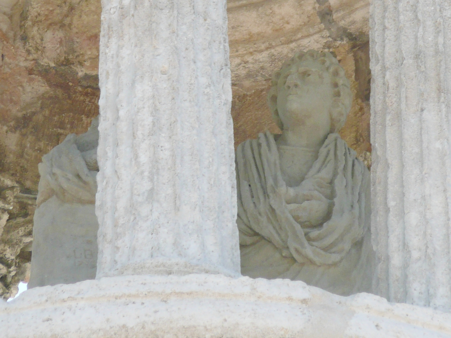 Glanum